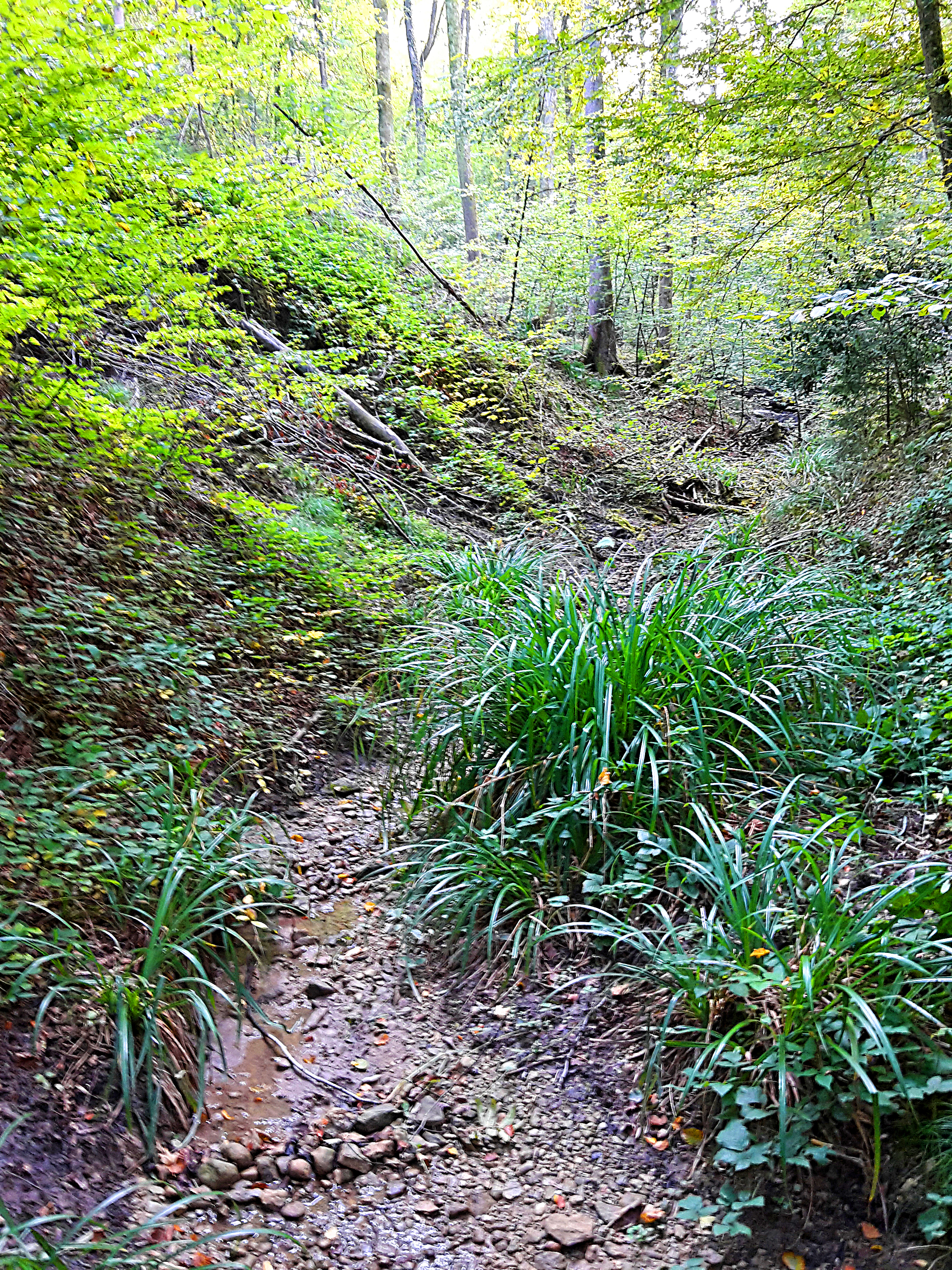 Tichelrütibach, Dübendorf